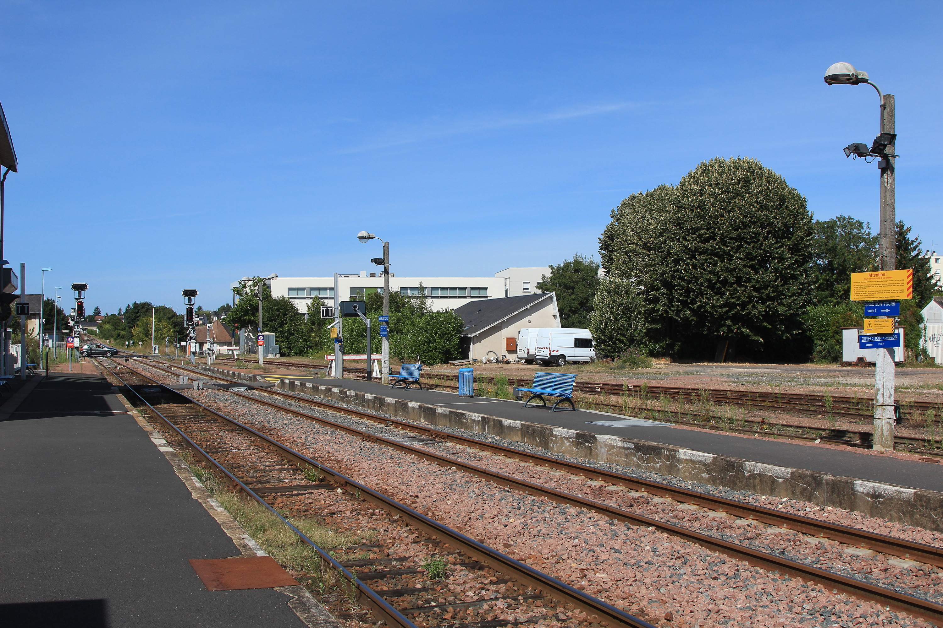 Vue en direction de Chinon et Loches depuis les quais de la gare de Joué-lès-Tours.